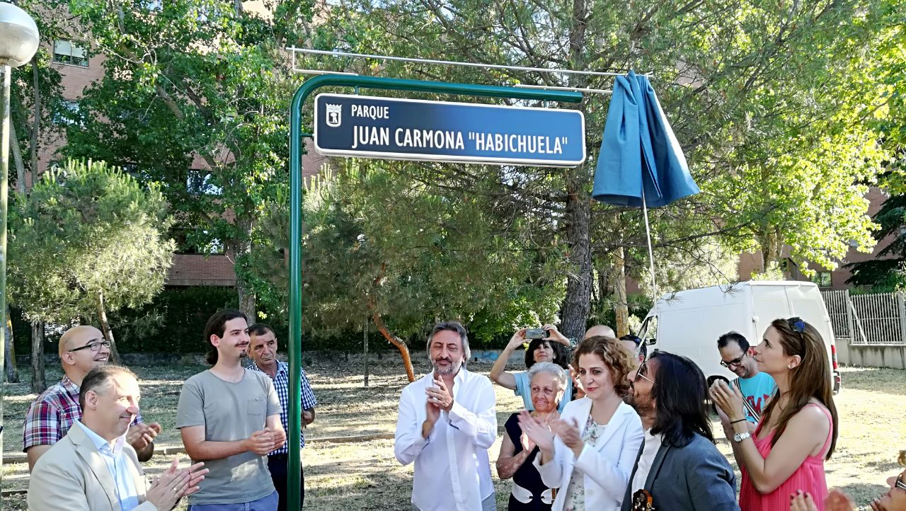 El guitarrista flamenco Juan Carmona, “Habichuela” será recordado en el madrileño barrio de Campamento gracias al parque que desde hoy lleva su nombre. El acto, que ha estado presidido por la concejala del distrito de Latina, Esther Gómez, y que ha contado con la presencia de Antonio Carmona, hijo del artista, entre otros familiares y amigos, se ha convertido en un pequeño homenaje a este vecino que, aunque nacido en Granada, pasó buena parte de su vida en el barrio de Campamento, en la carretera de Boadilla del Monte número 9, una zona muy próxima al lugar que ahora lleva su nombre.